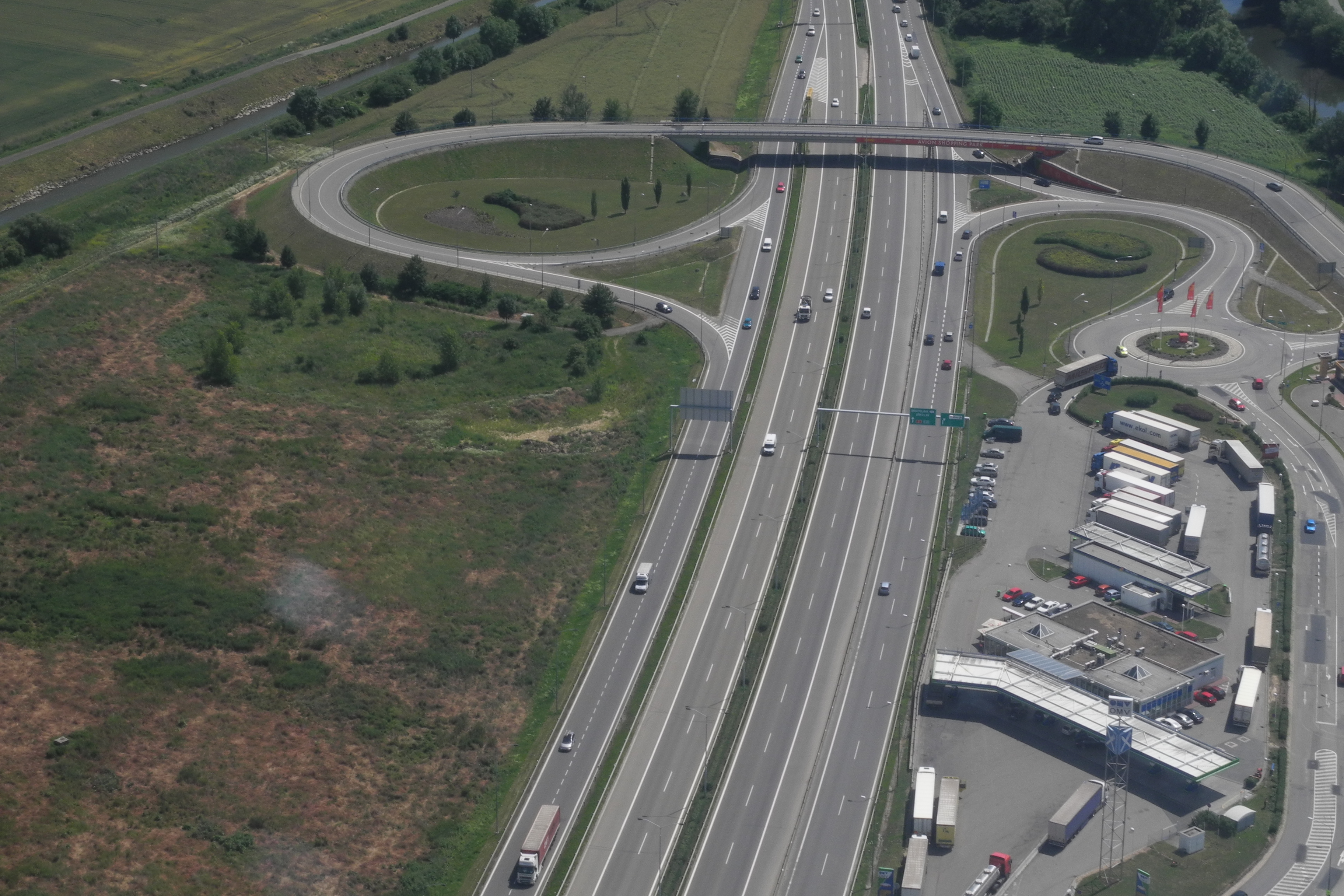 Dálnice D2 z Brna směrem na Bratislavu. V pozadí nájezd k Avion Shopping Parku.